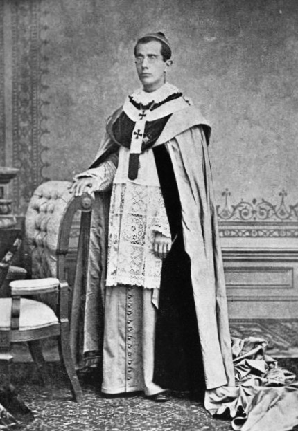 Obispo Ricardo Casanova y Estrada, arzobispo de Guatemala en 1897.